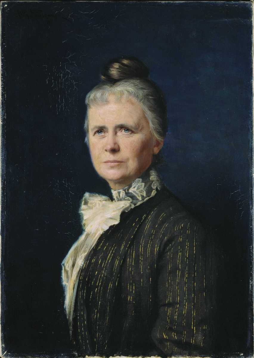 Ragna Nielsen født Ullmann (1845-1924) var en norsk pedagog og kvinnesakskvinne.